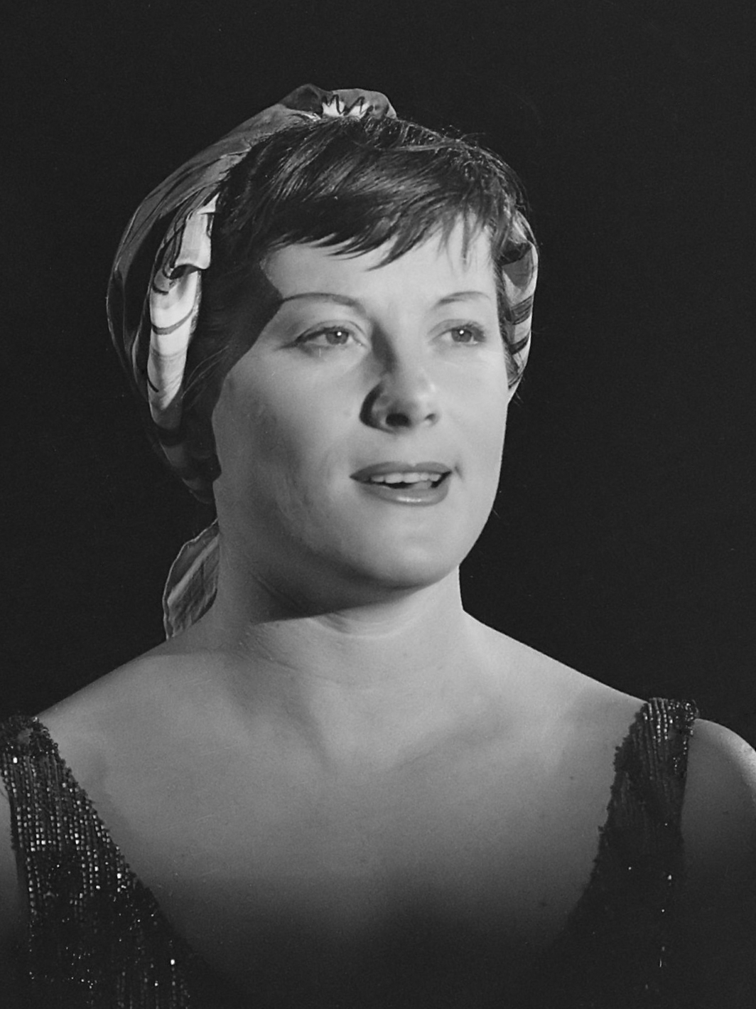 Colette Renard repeteert voor TV in Duivendrecht 29 december 1961